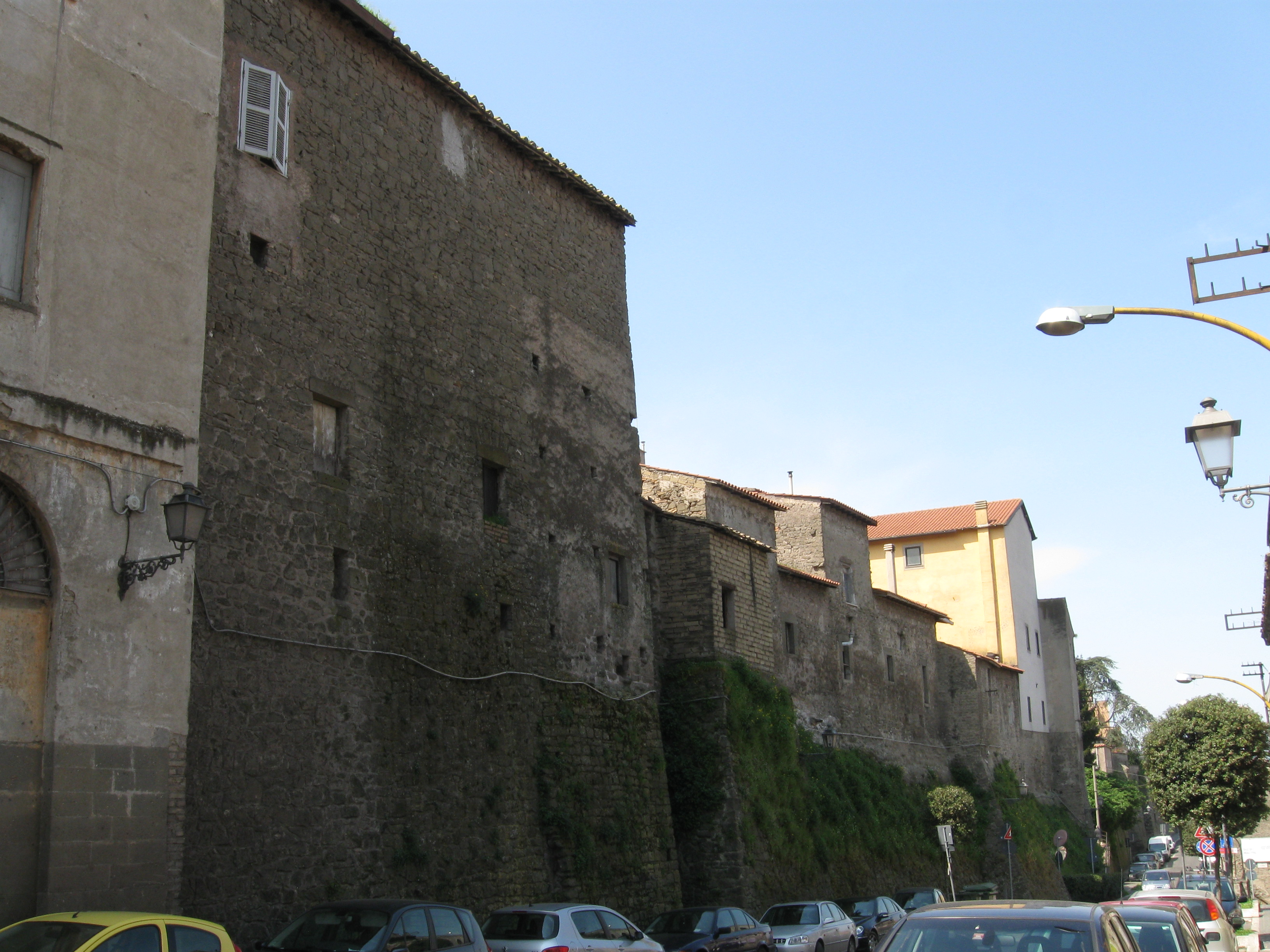 Mura medioevali di Marino (RM) in via Giuseppe Garibaldi